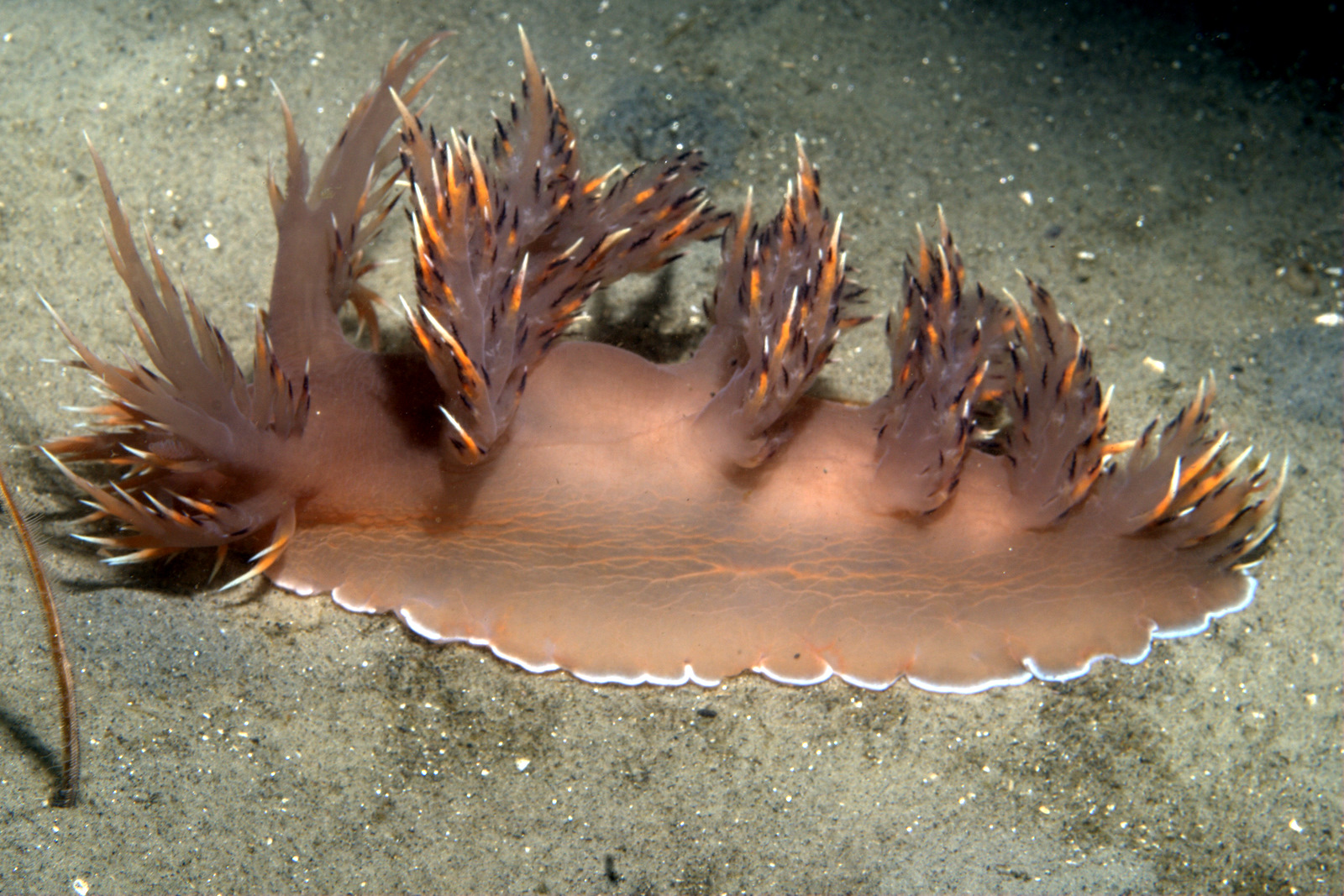 Dendronotus iris en Cannery Row, Monterey, California